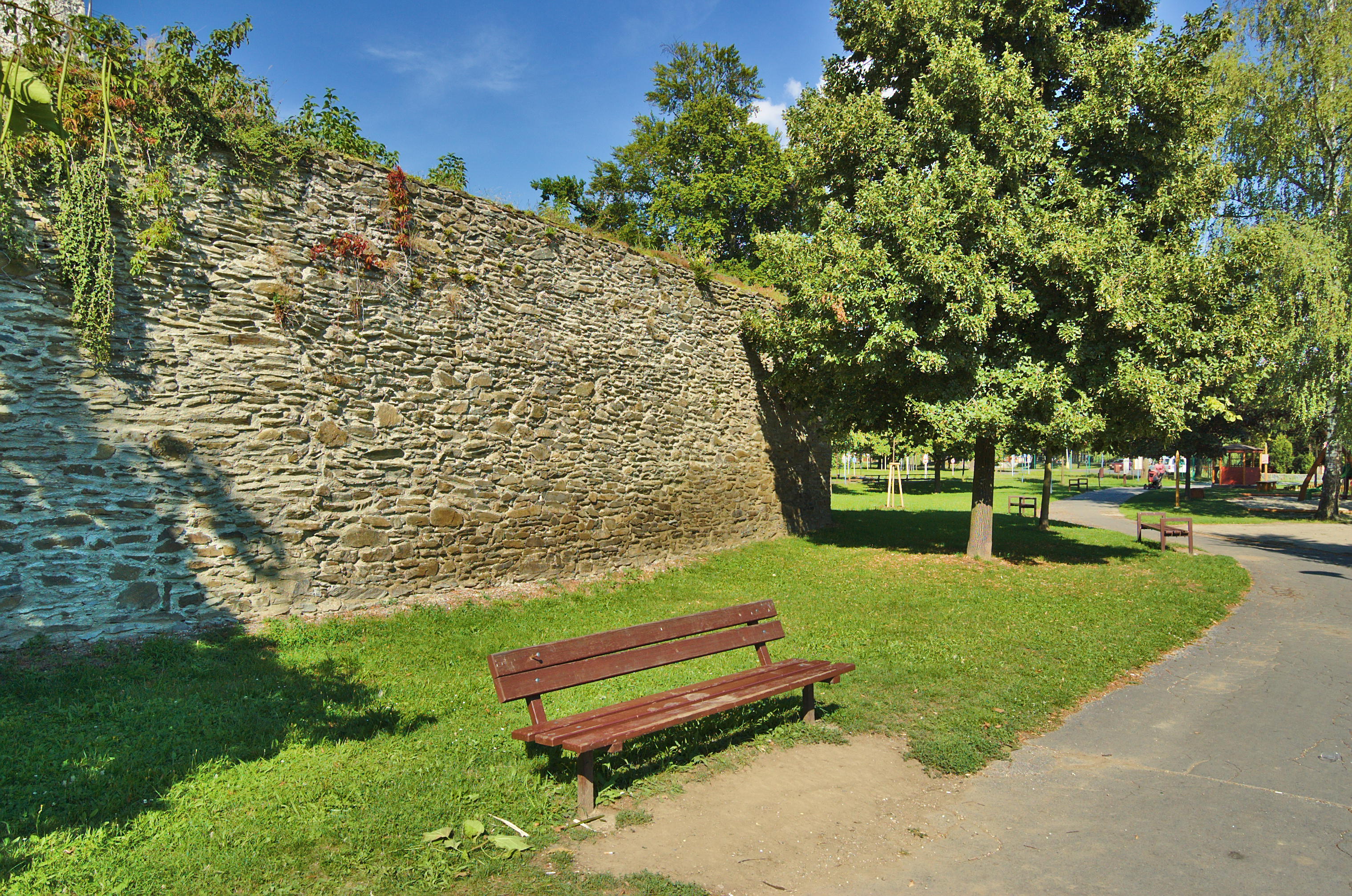 Městské hradby, Litovel, okres Olomouc